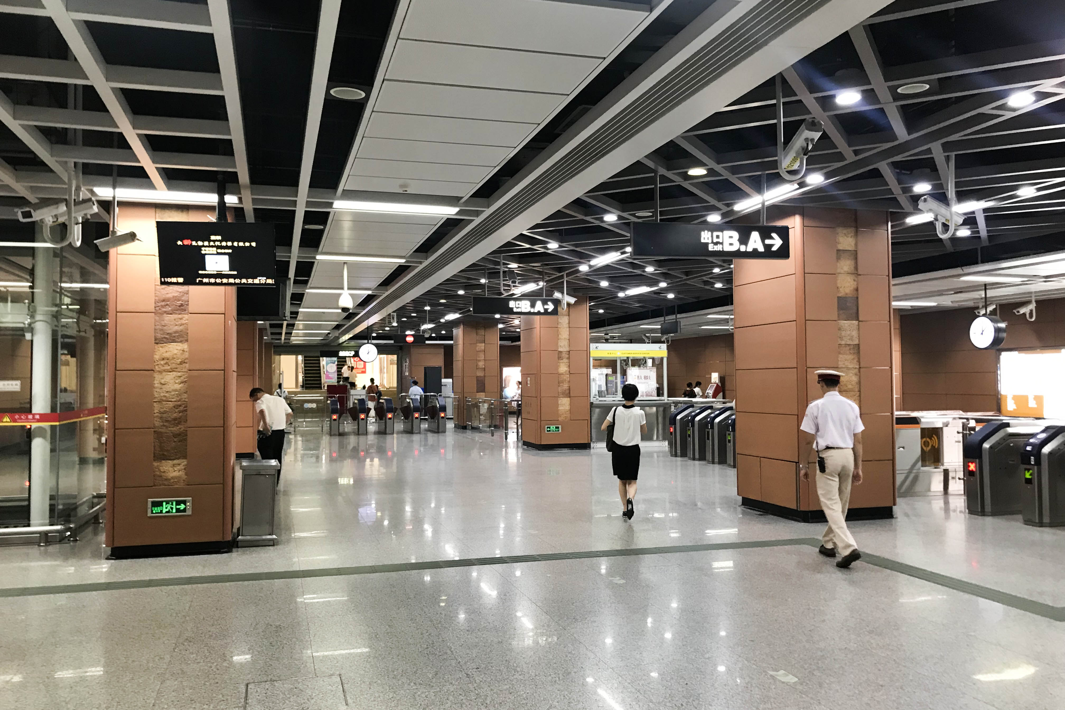 广佛地铁金融高新区站